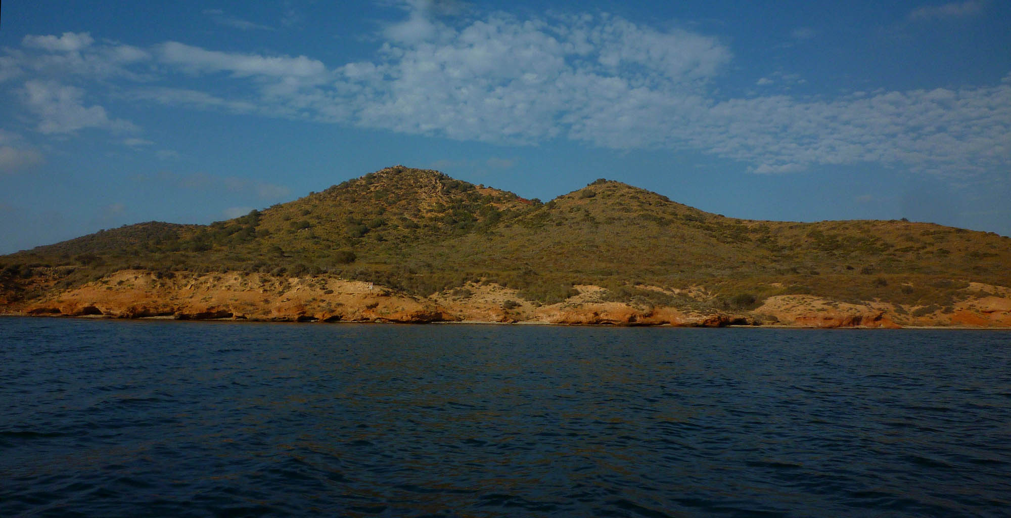 Isla del Barón en el Mar Menor, Región de Murcia, España